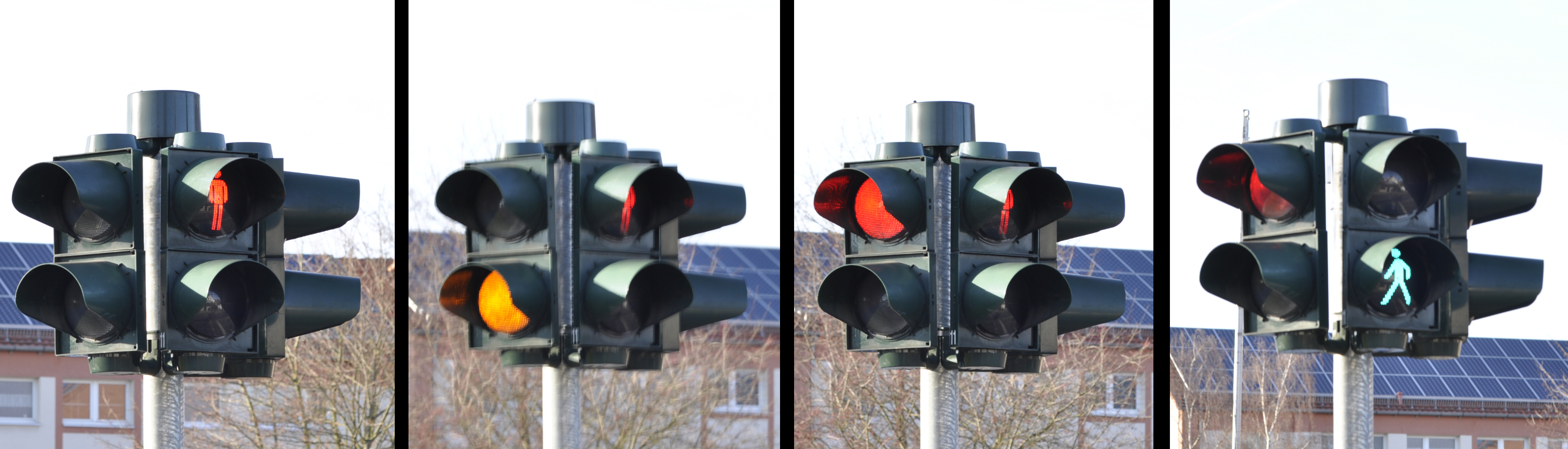 Autoampel mit 3-Phasenschaltung und Fußgängerampel (Bedarfsampel), Göttingen, Königsstieg/Greitweg, 31.12.2013. Die Autoampel hat kein Grünlicht. Fotos: Francisco Welter-Schultes.